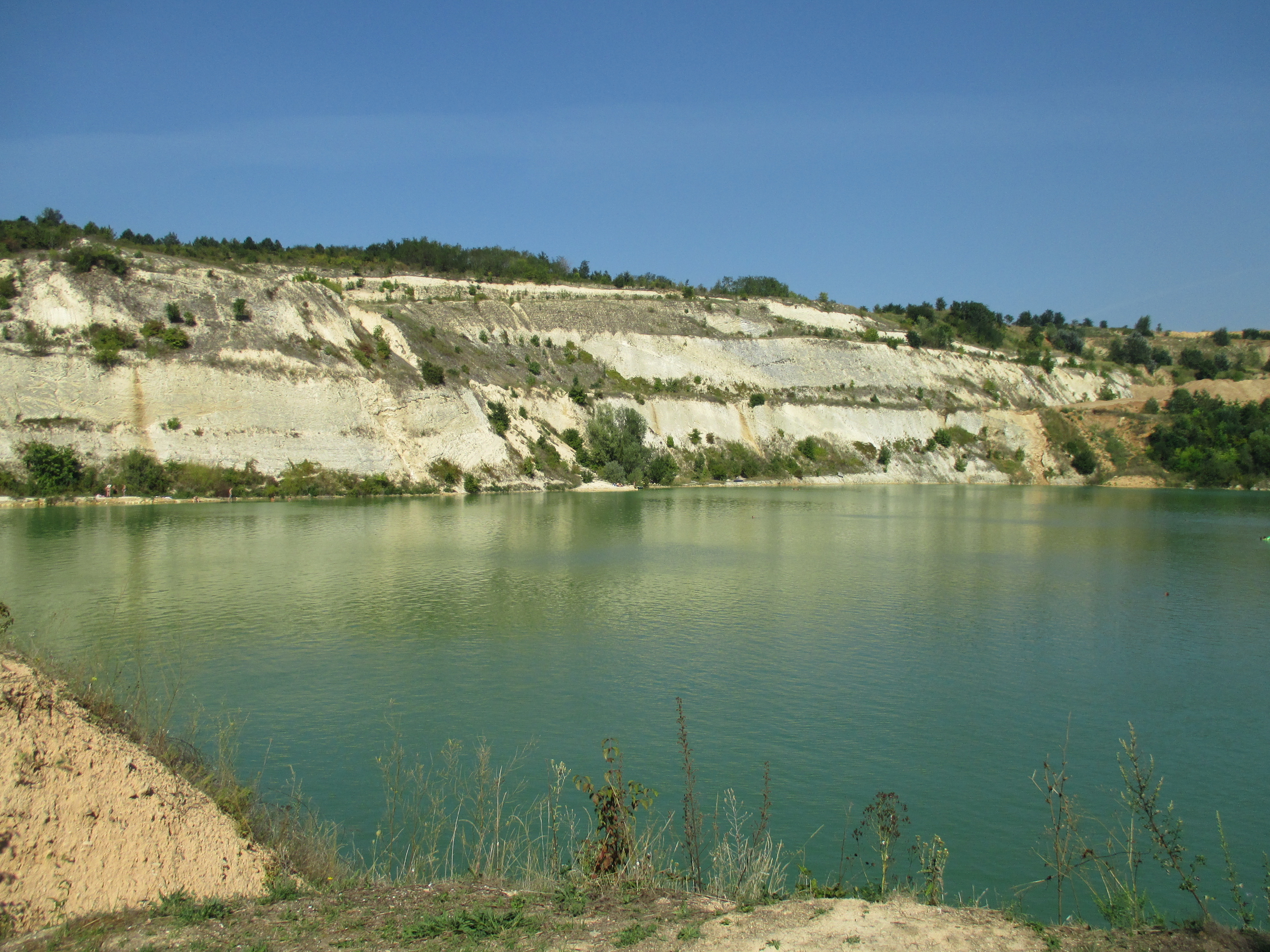 Ово је фотографија заштићеног природног добра у Србији под шифром: НП01 This is a a photo of a natural area in Serbia with ID: НП01 Fruška gora - jedno od mnogih jezera na Fruškoj gori nastalih na mestima napuštenih rudnika.